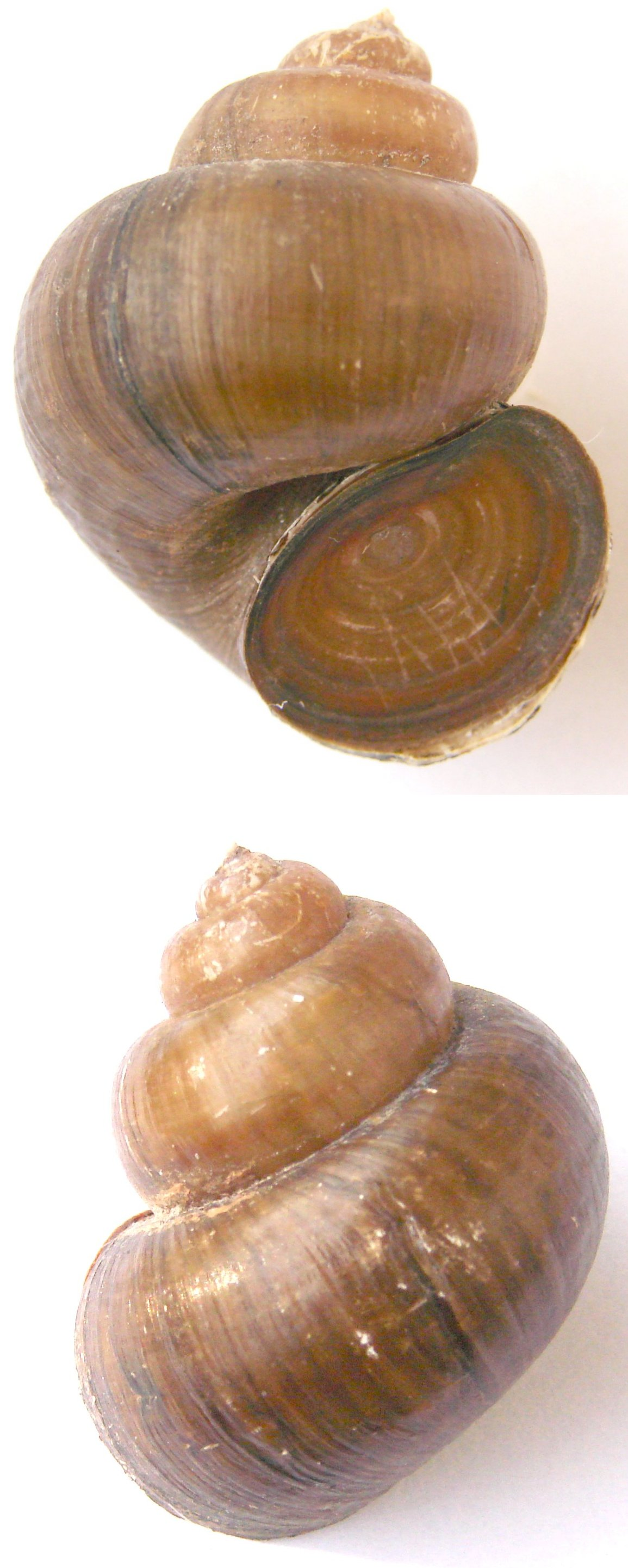 Żyworódka pospolita (Viviparus contecus)